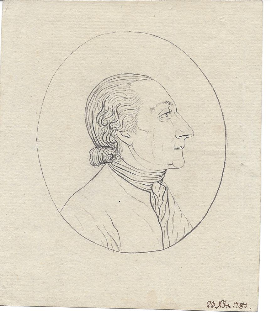 Johann Kaspar Lavater, 23. Dezember 1780, Umrisszeichnung mit grauer Tusche von Georg Friedrich Schmoll